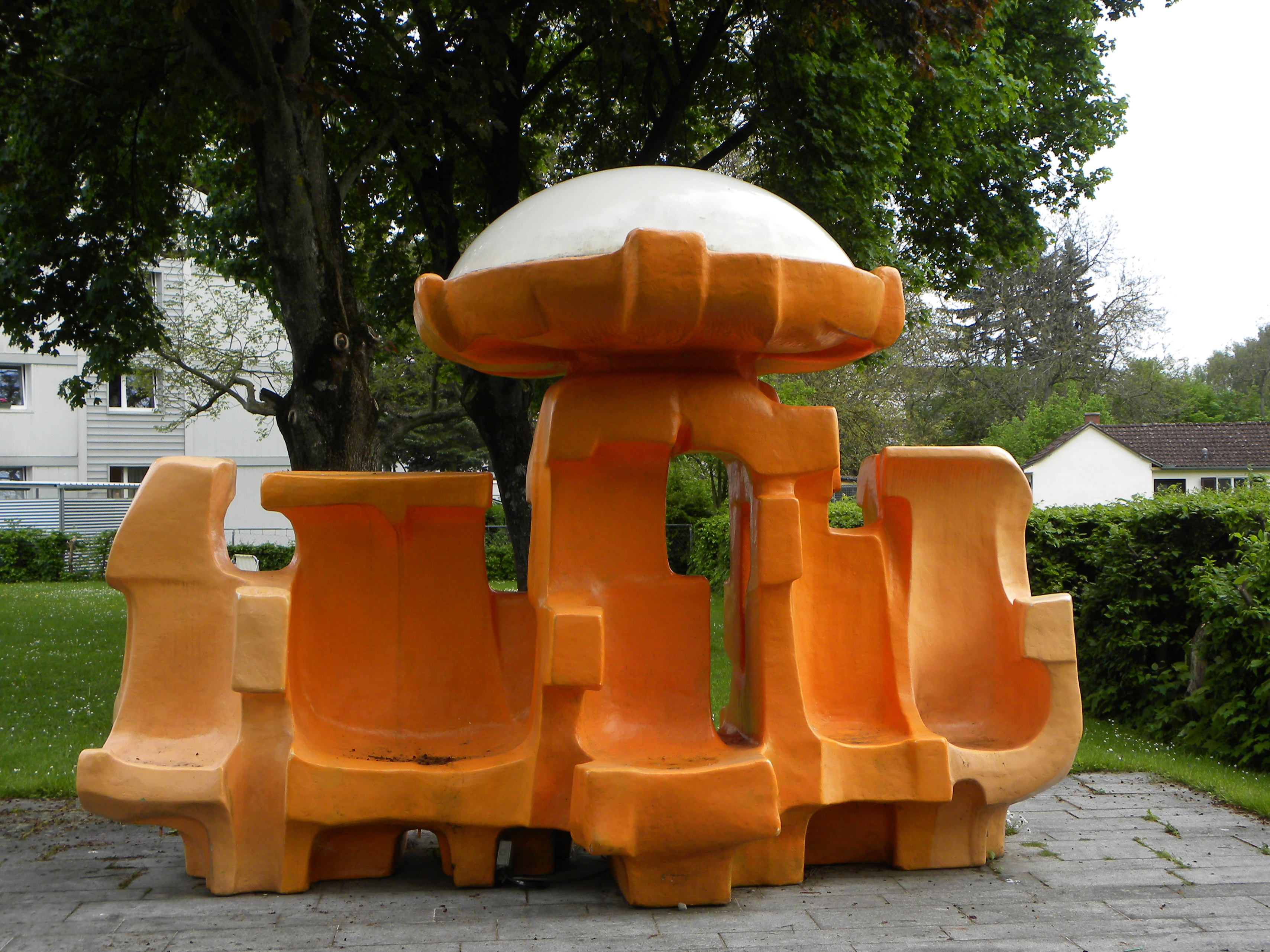 Ruhezone